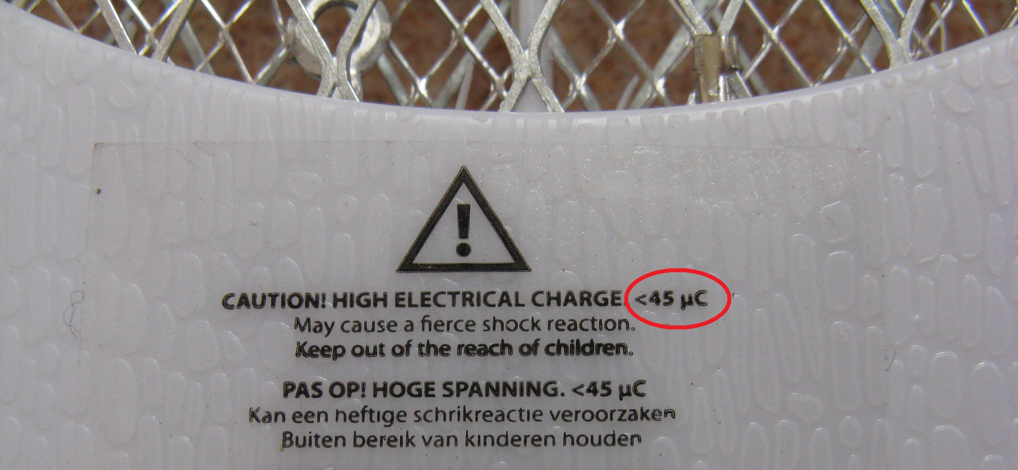 Veiligheidsmaatregel voor mensen die de vliegenmepper gebruiken: maximumlading 45uC.